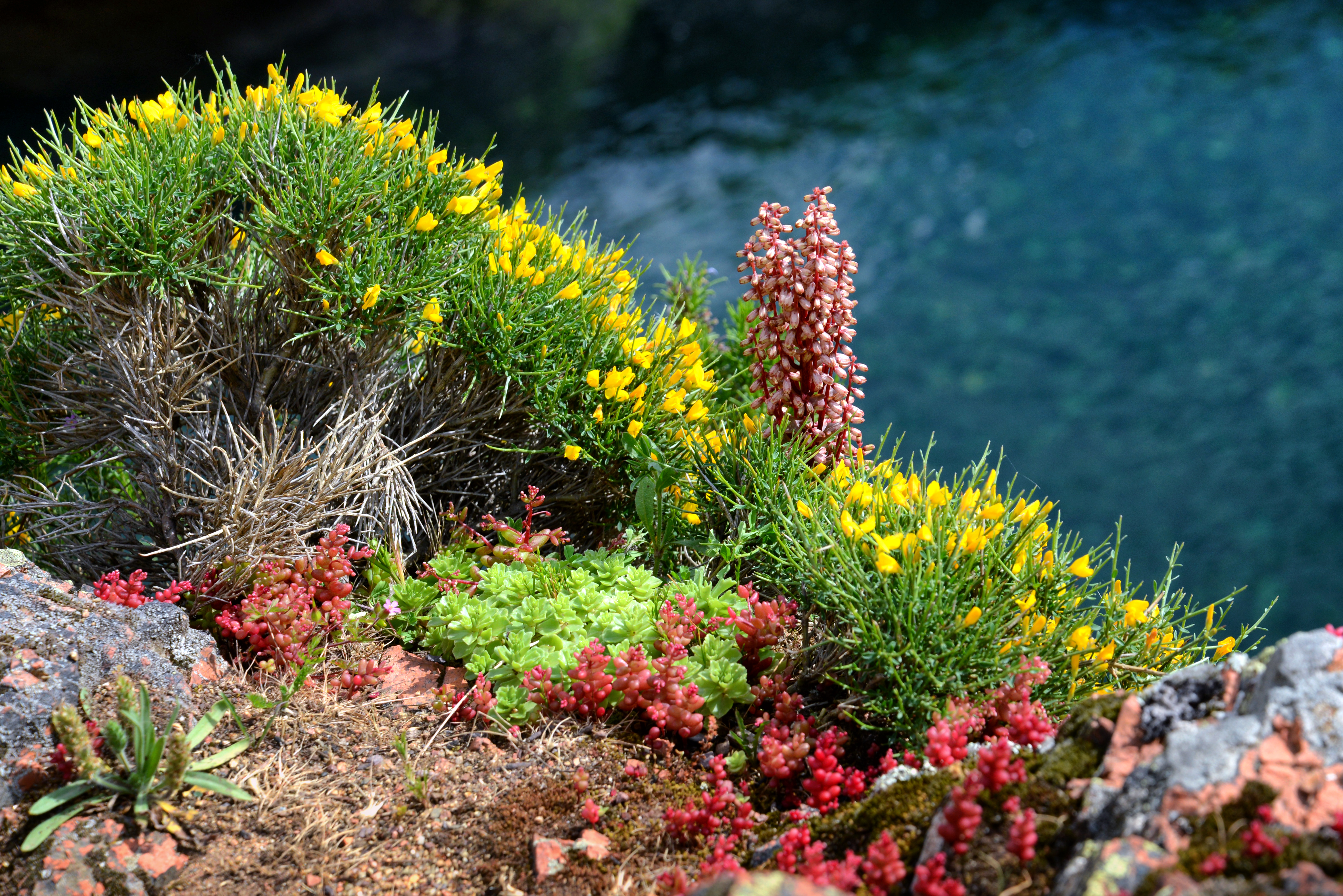 Galéria, Falasorma/Balagne (Corse) - Composition florale avec genêt de Corse (Genista corsica), nombril de Vénus (Umbilicus rupestris), orpin bleuâtre (Sedum caeruleum), etc. au Ponte Vecchiu, pont génois sur le Fango.